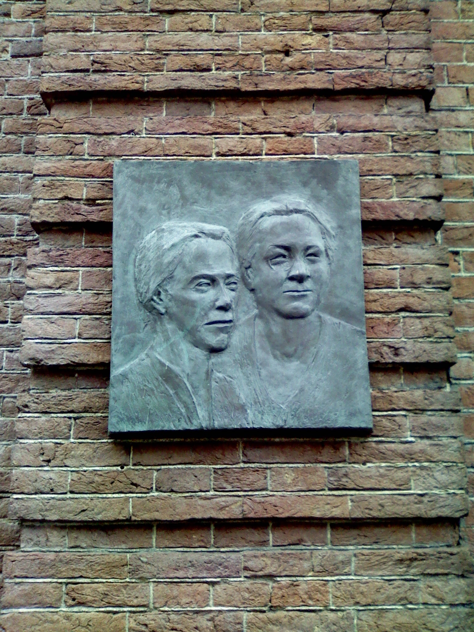 Herinneringsplaquette voor Aaf Dell en Dieuw van Vliet.